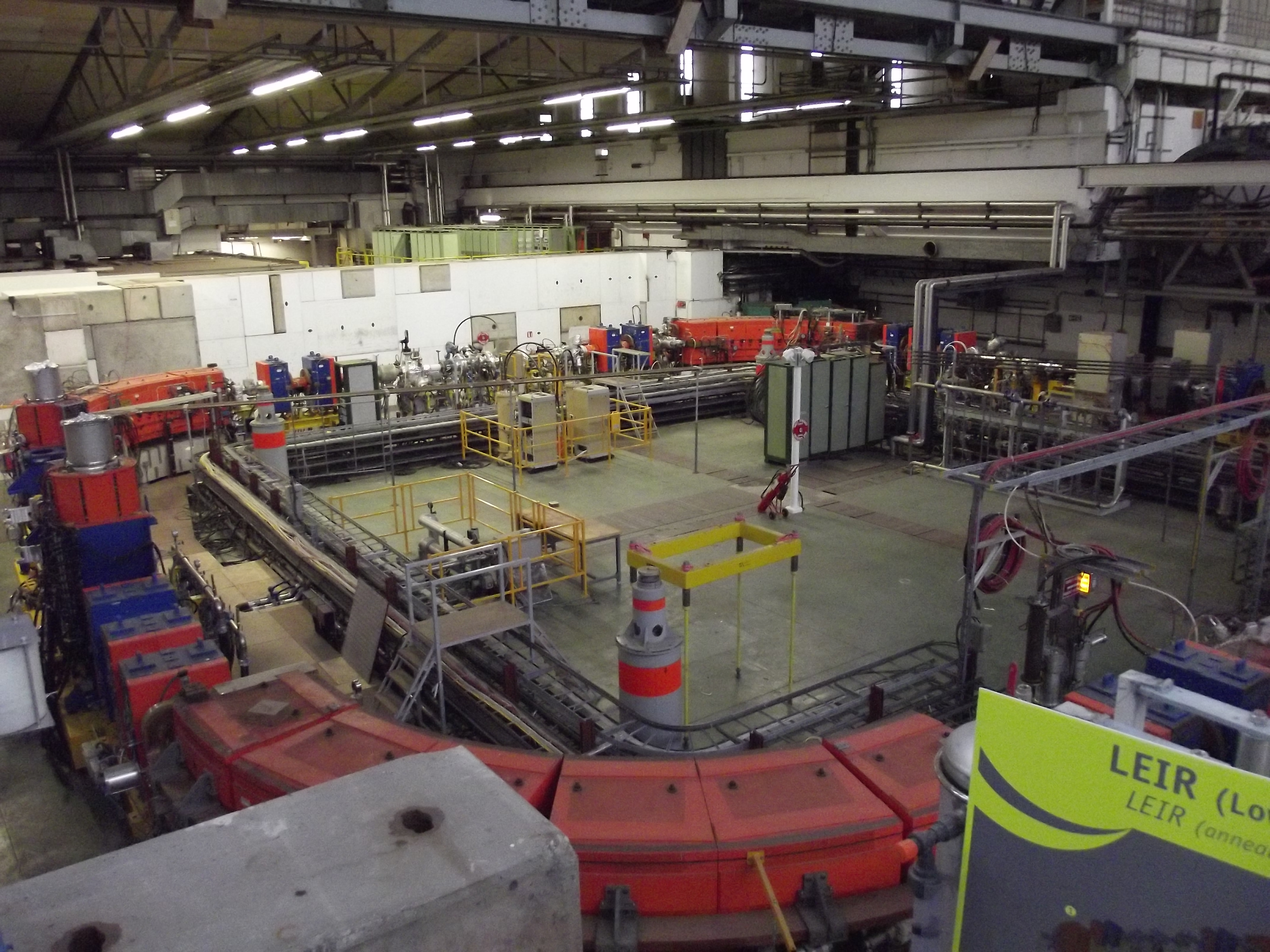 סריג מגנטים במאיץ LEIR בCERN צולם ע"י: קובי שוורצבורד